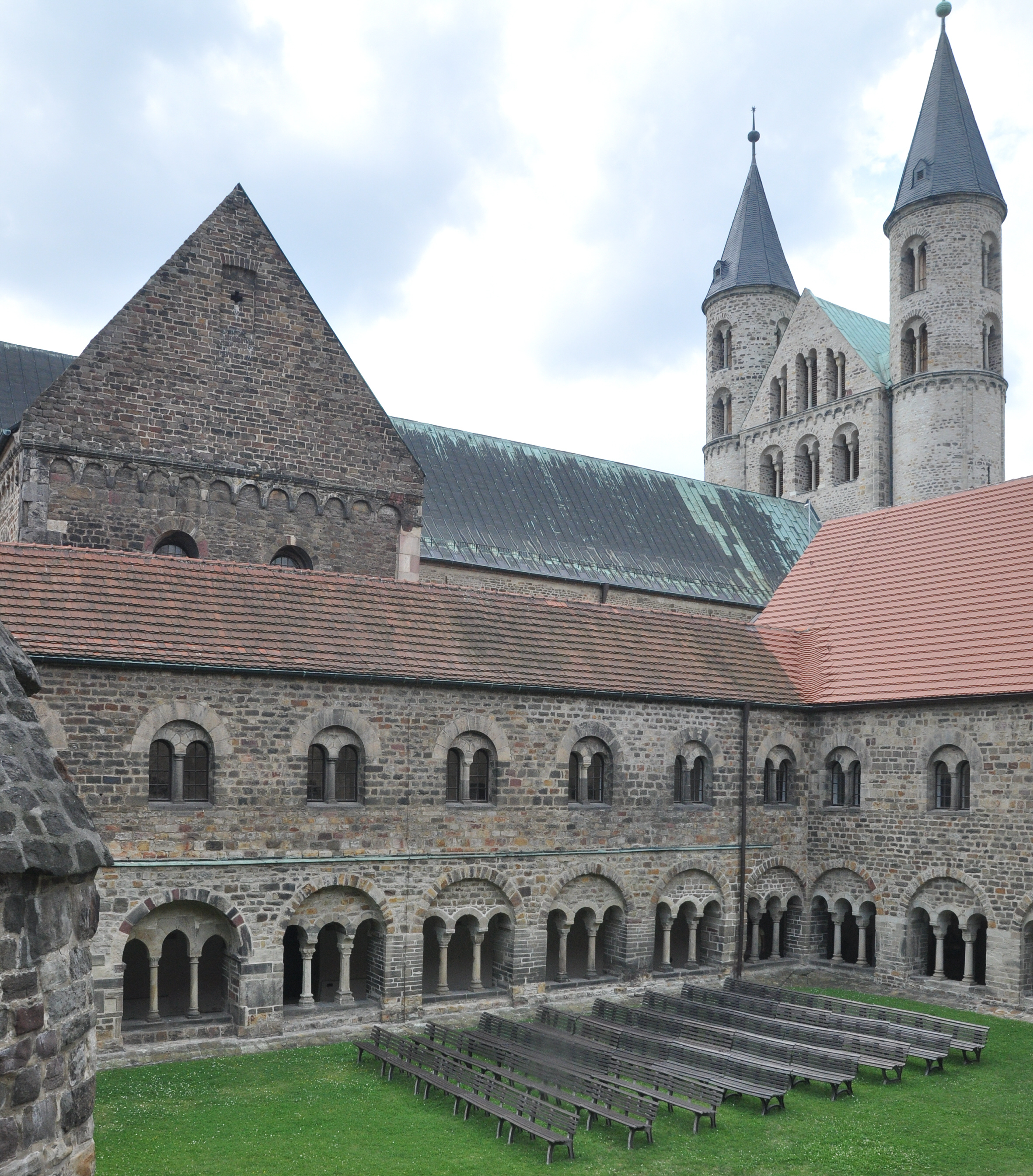 Ansicht des südlichen Kreuzgangflügels und der ehem. Stiftskirche vom 1. OG aus gesehen (links Mauerwerk der Tonsur)